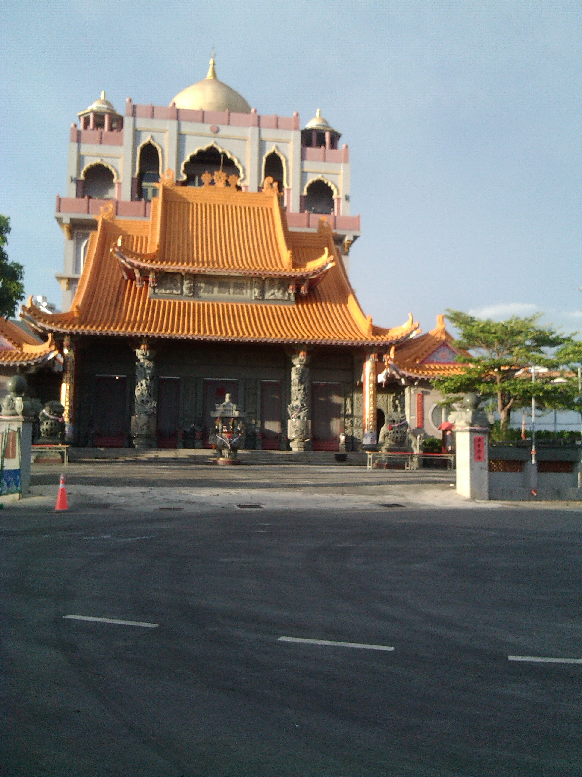 位於永華路及永達路口 主祀奉南普陀南普陀觀世音佛祖